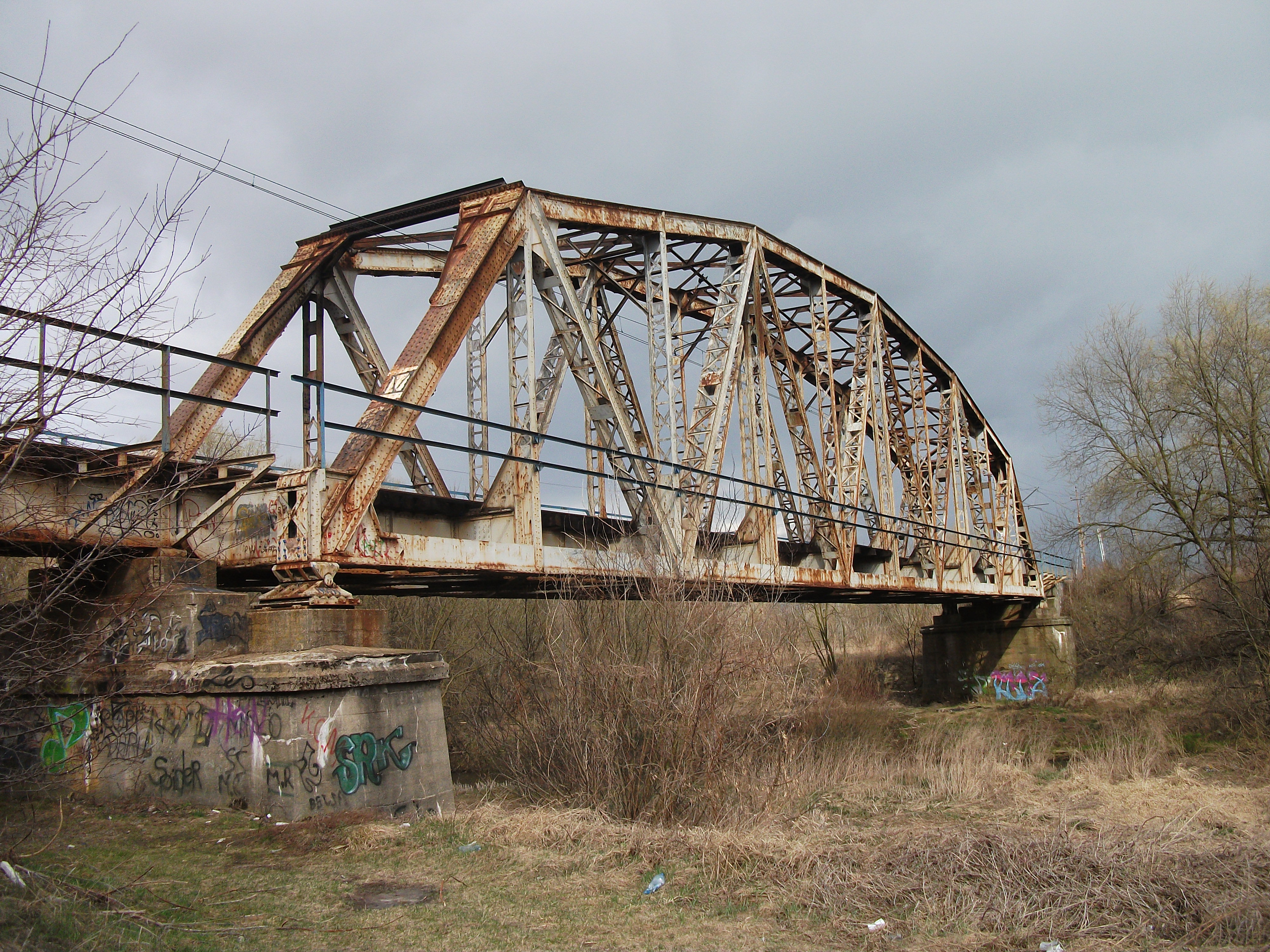 Wieruszów: Most w ciągu linii kolejowej nr 181 nad rzeką Prosna